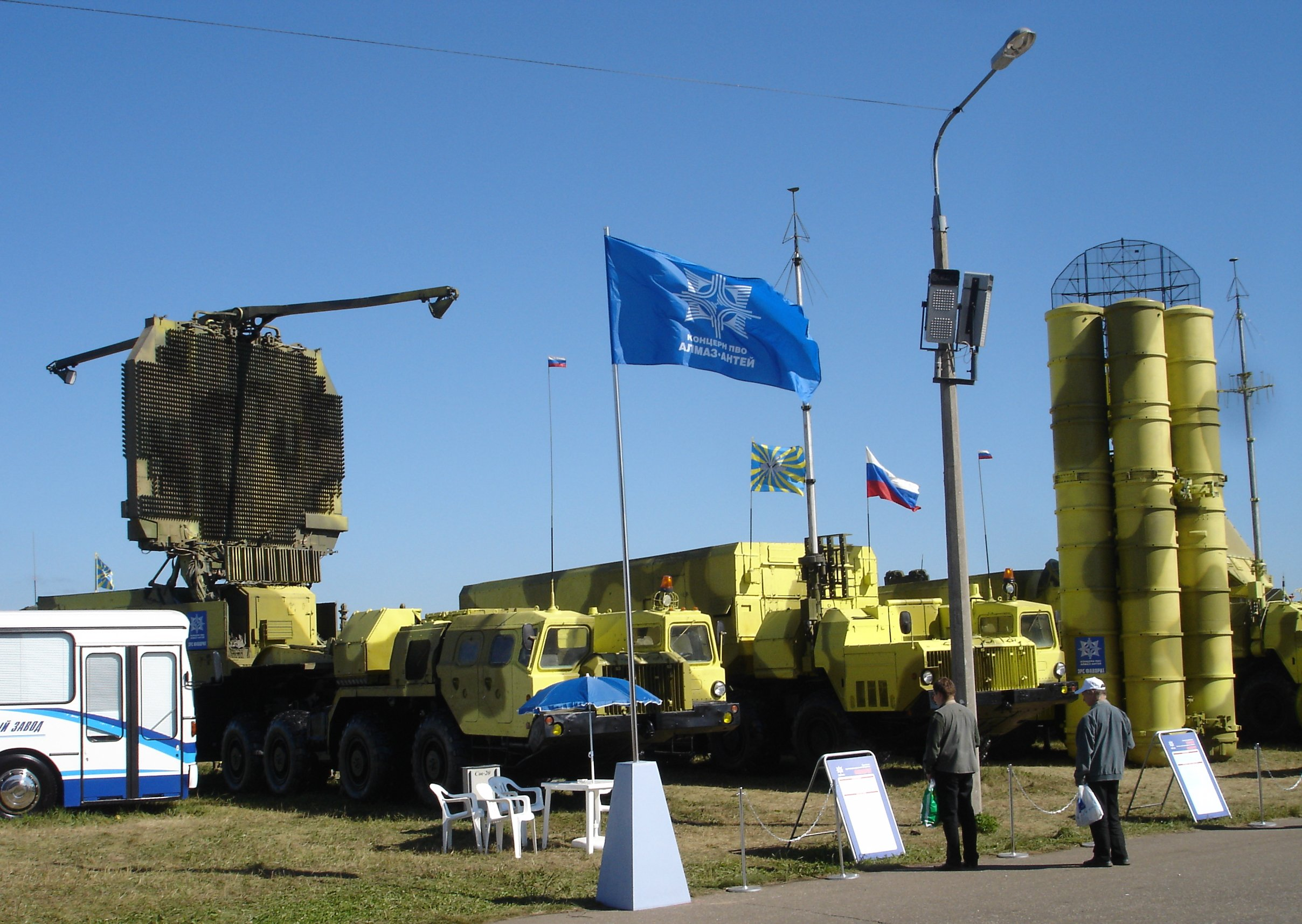 S-300PMU2 "Favorit" SAM system MAKS, Zhukovskiy, 2005